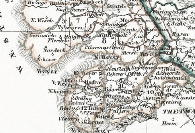 Detail fra "Slesvig i Valdemarernes Tid" efter Valdemars Jordebog